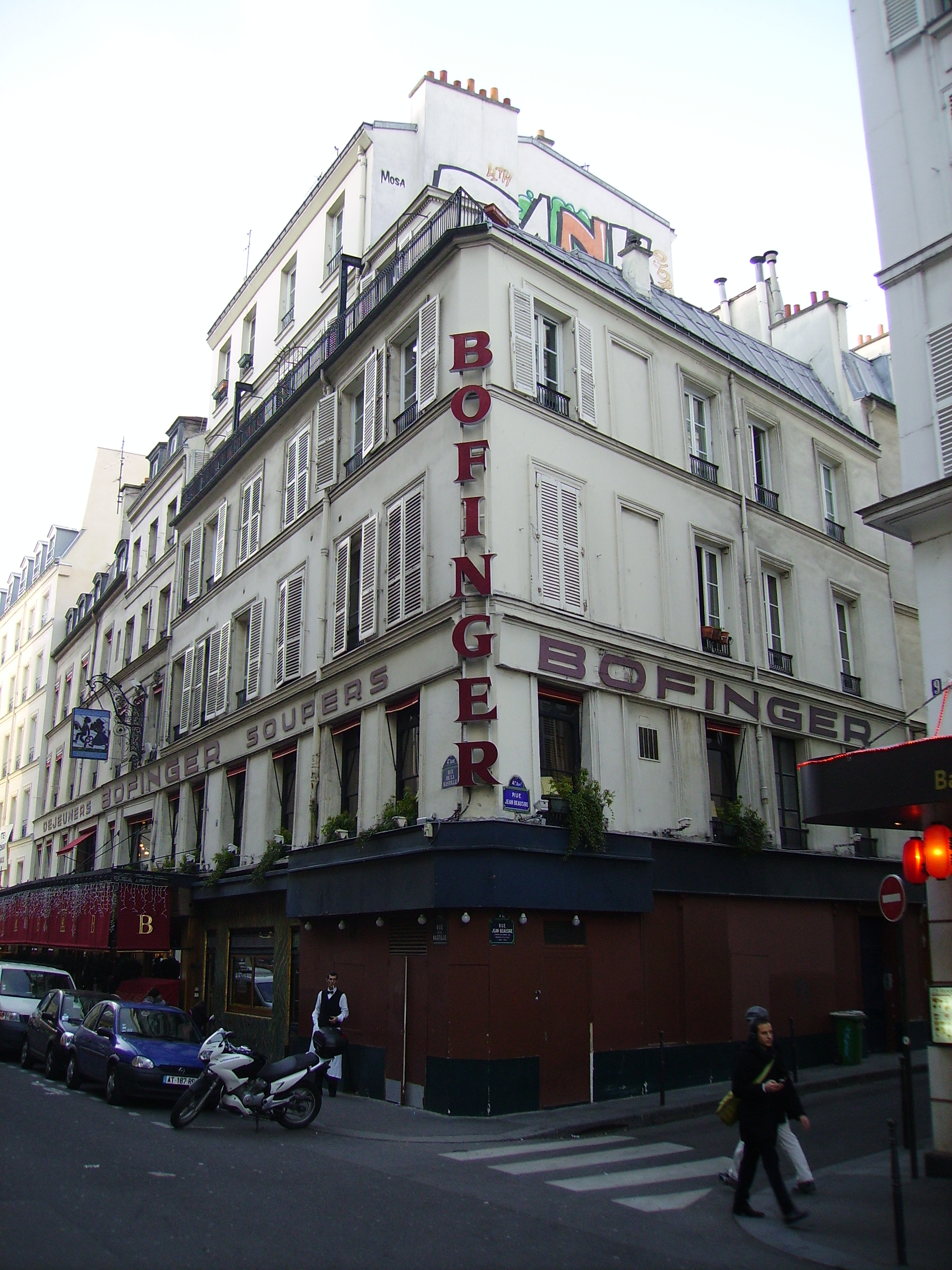 Brasserie Bofinger - 3,5,7 rue de la Bastille-1 rue Jean Beausire